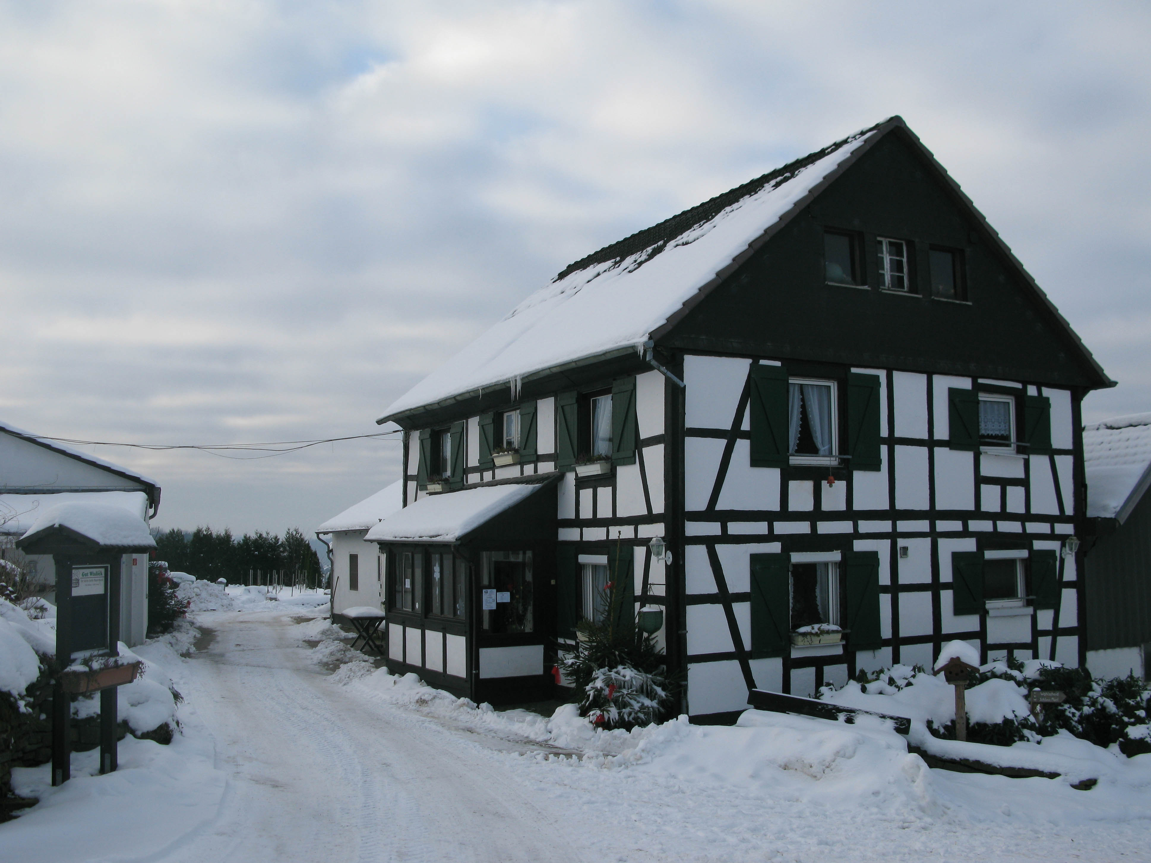 Gut Windlöck Denkmalliste der Stadt Lohmar Nr 130 am 30. Dezember 2010